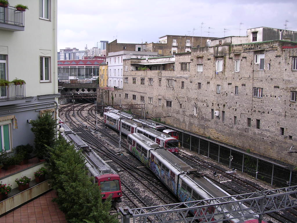 Italie Naples avant-gare du Circumvesuviana